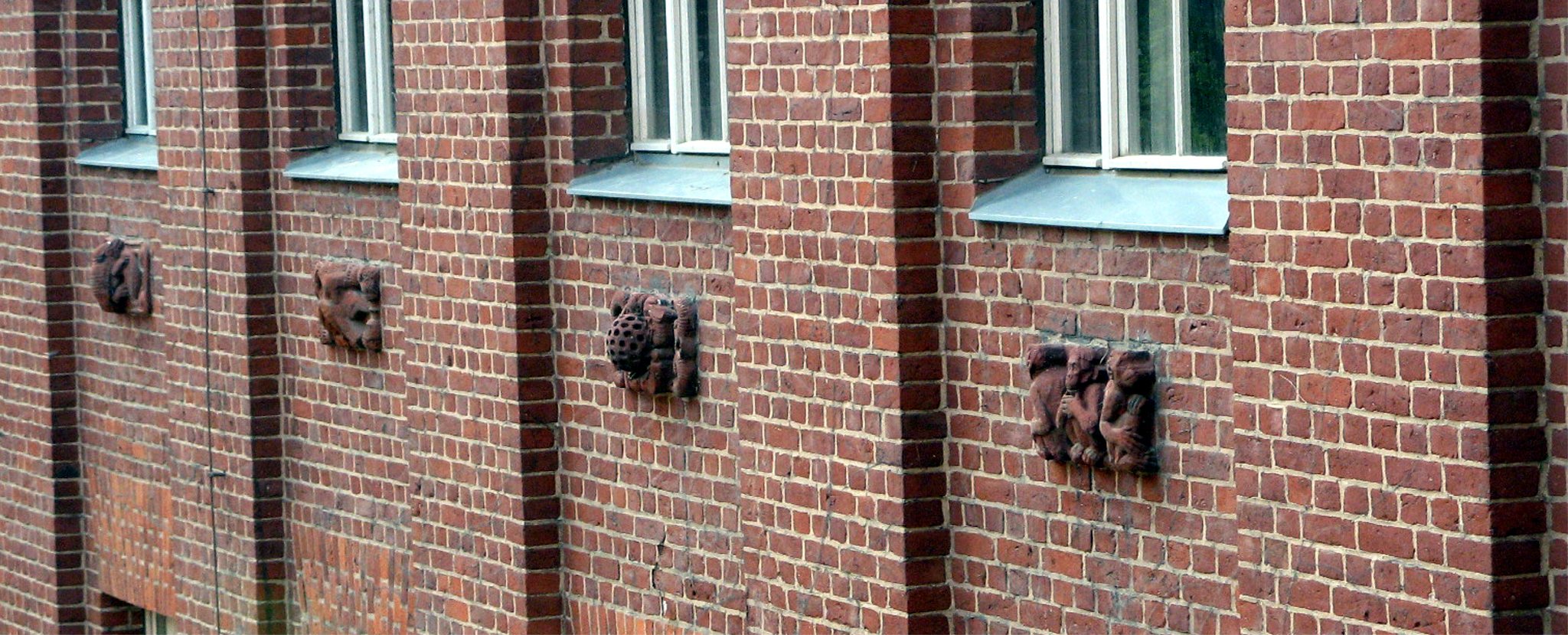 Terrakotten von Georg Wrba (1872-1939) an der Hoffassade des Hoffmannschen Schulgebäudes in der Lasdehner Straße.